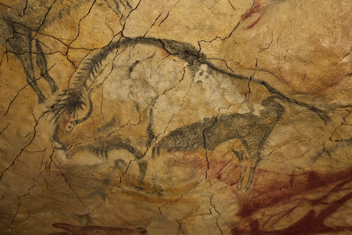 Bisonte Magdaleniense negro National Museum and Research Center of Altamira Native nameMuseo Nacional y Centro de Investigación de AltamiraLocationSantillana del Mar, Cantabria, SpainCoordinates43° 22′ 38.64″ N, 4° 07′ 21″ W Established2001Web pageOfficial website (Ministerio de Cultura de España)Authority control : Q6974445 VIAF: 128323966 ISNI: 0000 0001 2155 3446 LCCN: n82069066 GND: 1082945-3 SUDOC: 070414459 WorldCat institution QS:P195,Q6974445